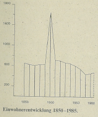 Stark zu sehen ist hier die explosive Bevölkerungsentwicklung während der Tunnelbauphase in Bergün, zu welchem auch der Bauort Preda gehört.